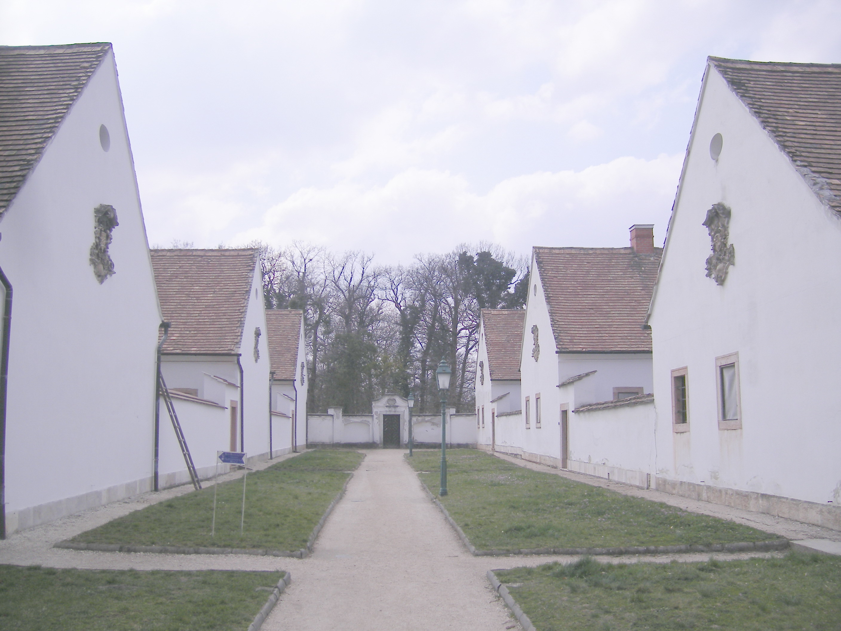 Oroszlány - majkpusztai kamalduli apátság